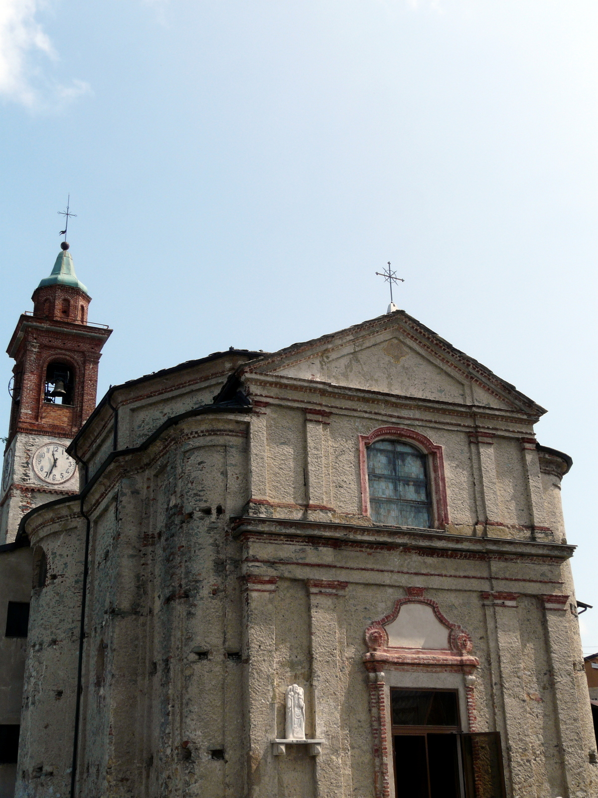 Chiesa di San Giacomo, San Giacomo, Roburent, Piemonte, Italia